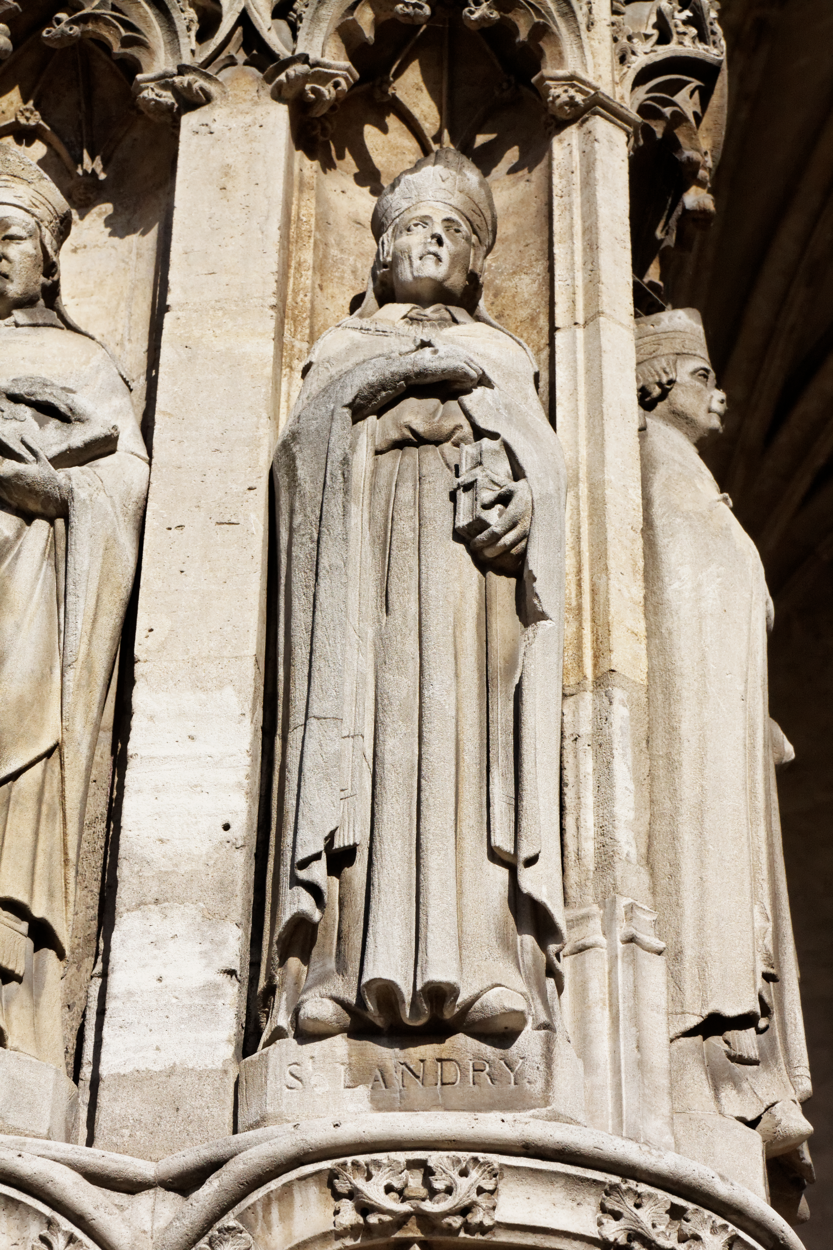 L'église Saint-Germain l'Auxerrois à Paris.